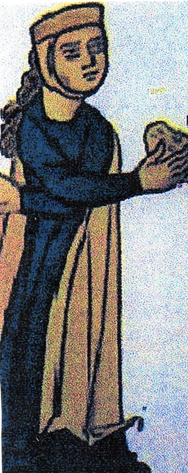 la reine de Sardaigne Adelasia de Lacon (1207-1259)